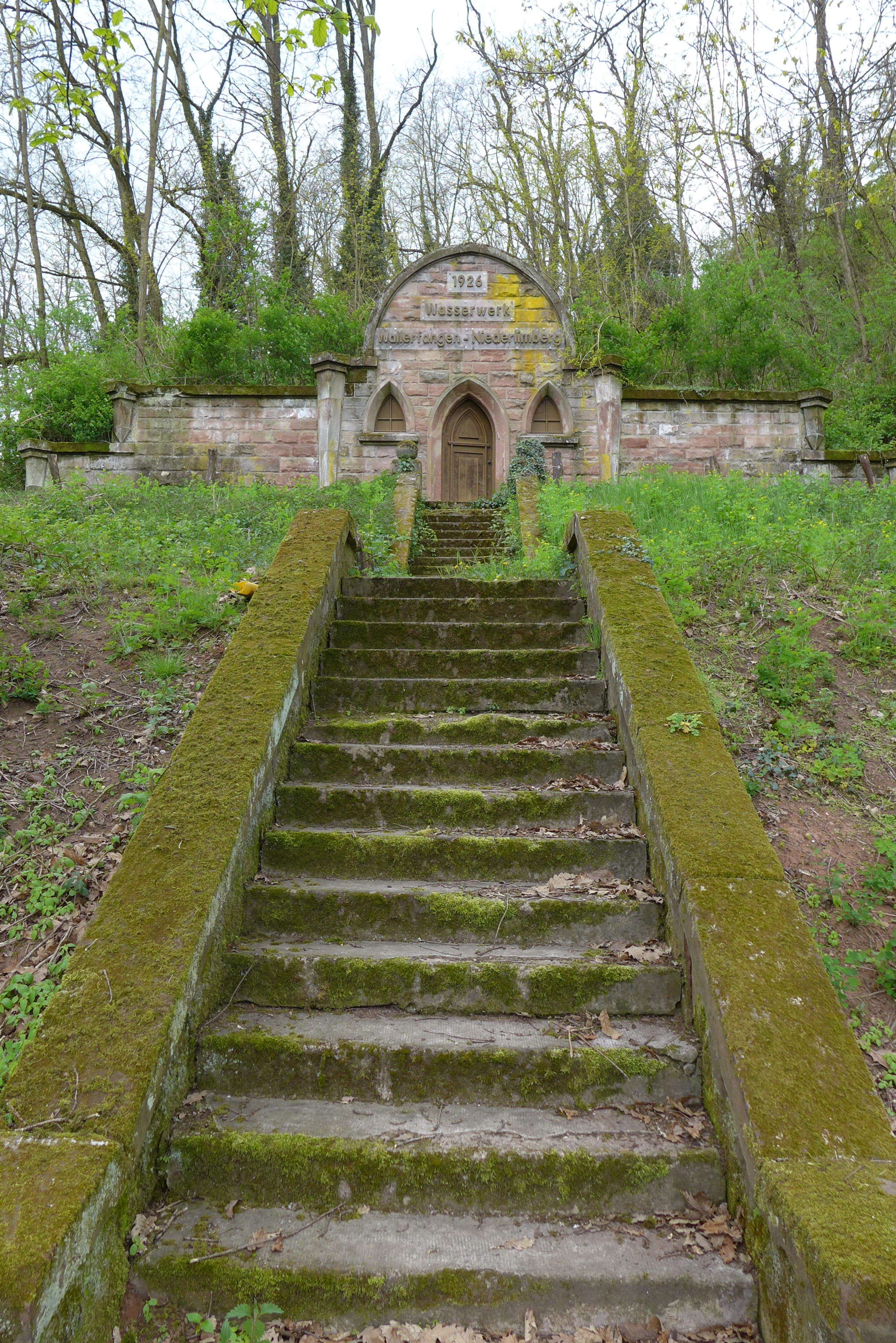 Wallerfangen, Wallerwerk Niederlimberg am Hansenberg